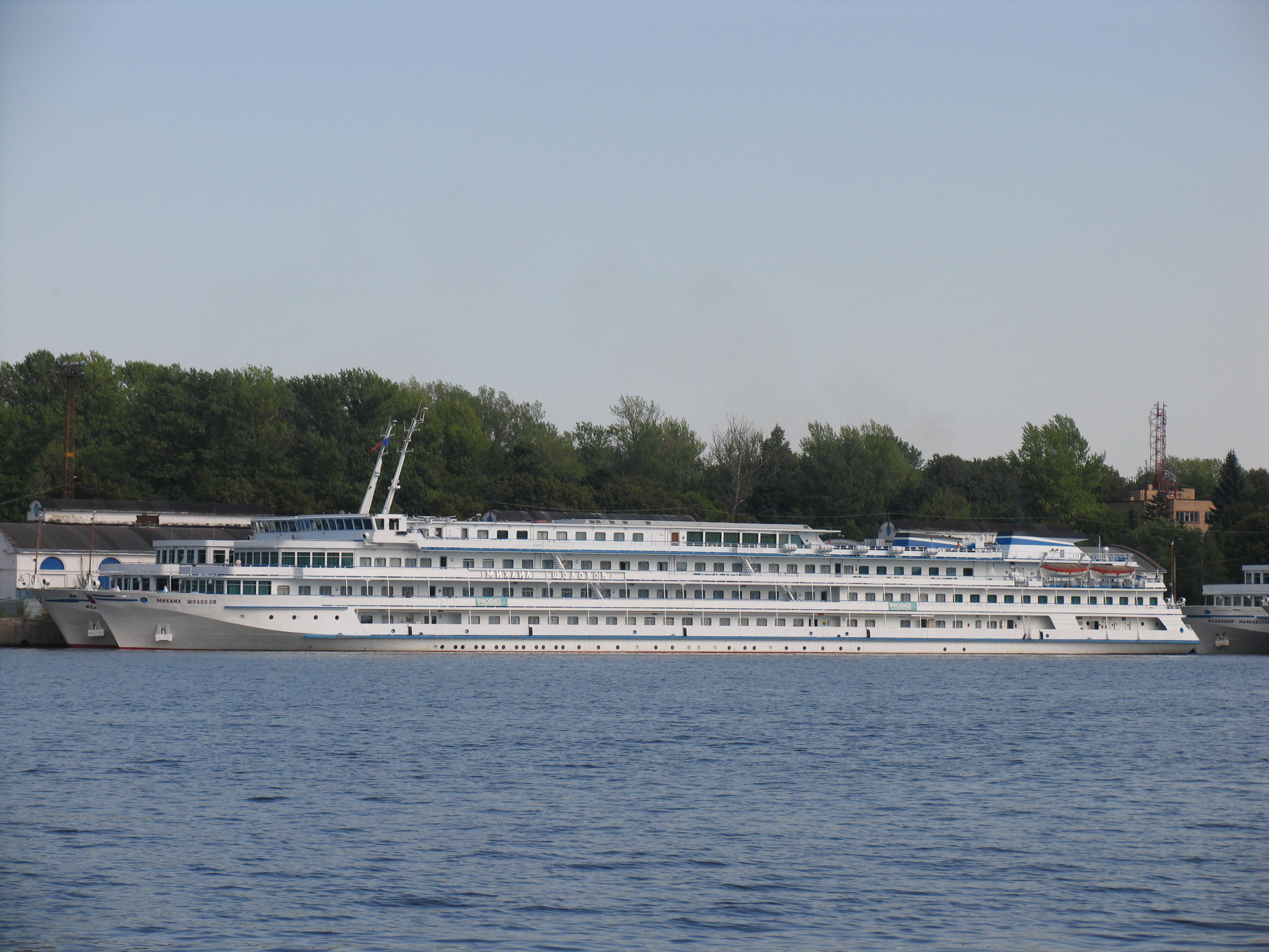 Теплоход "Михаил Шолохов" у причала Северного речного вокзала